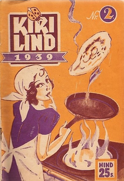 Ajakiri Kirilind